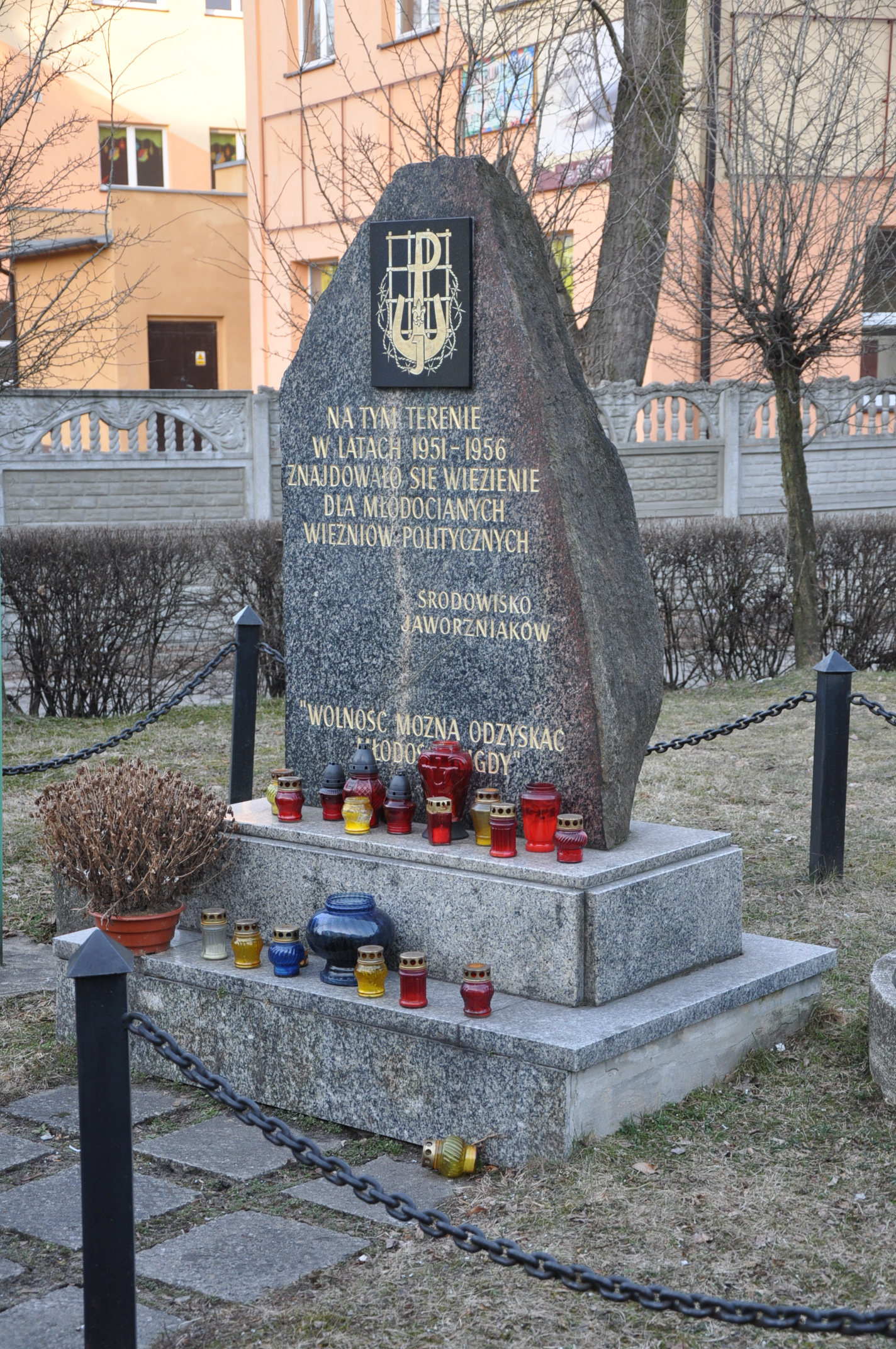 Jaworzno, Osiedle Stałe, ul.Inwalidów Wojennych. Teren byłego obozu. Pomnik "Jaworzniaków" Związku Młodocianych Więźniów Politycznych Okresu Stalinowskiego (lat 1944-1956).